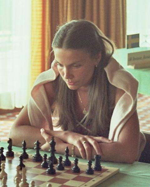 Marina Pogorevici (verheiratete Makropoulou) 1982 in Bad Kissingen